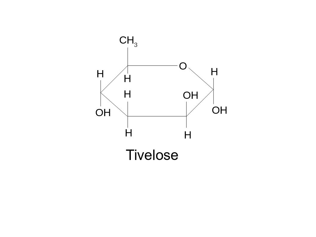 Estrutura química da tivelose